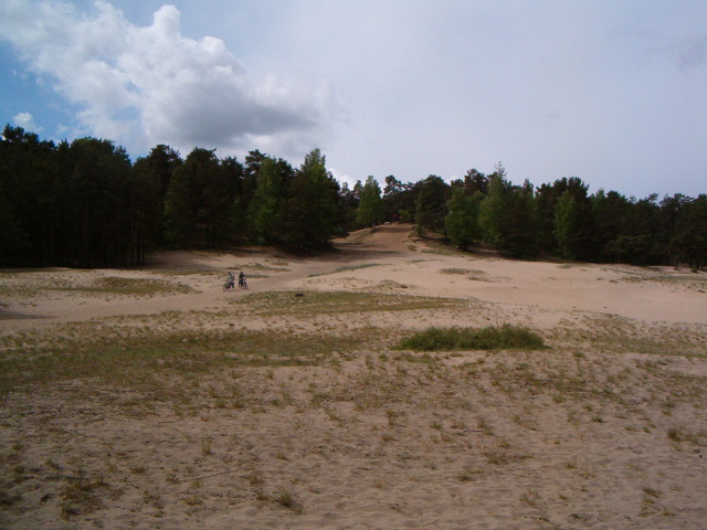 Lamekas. Mustamäe